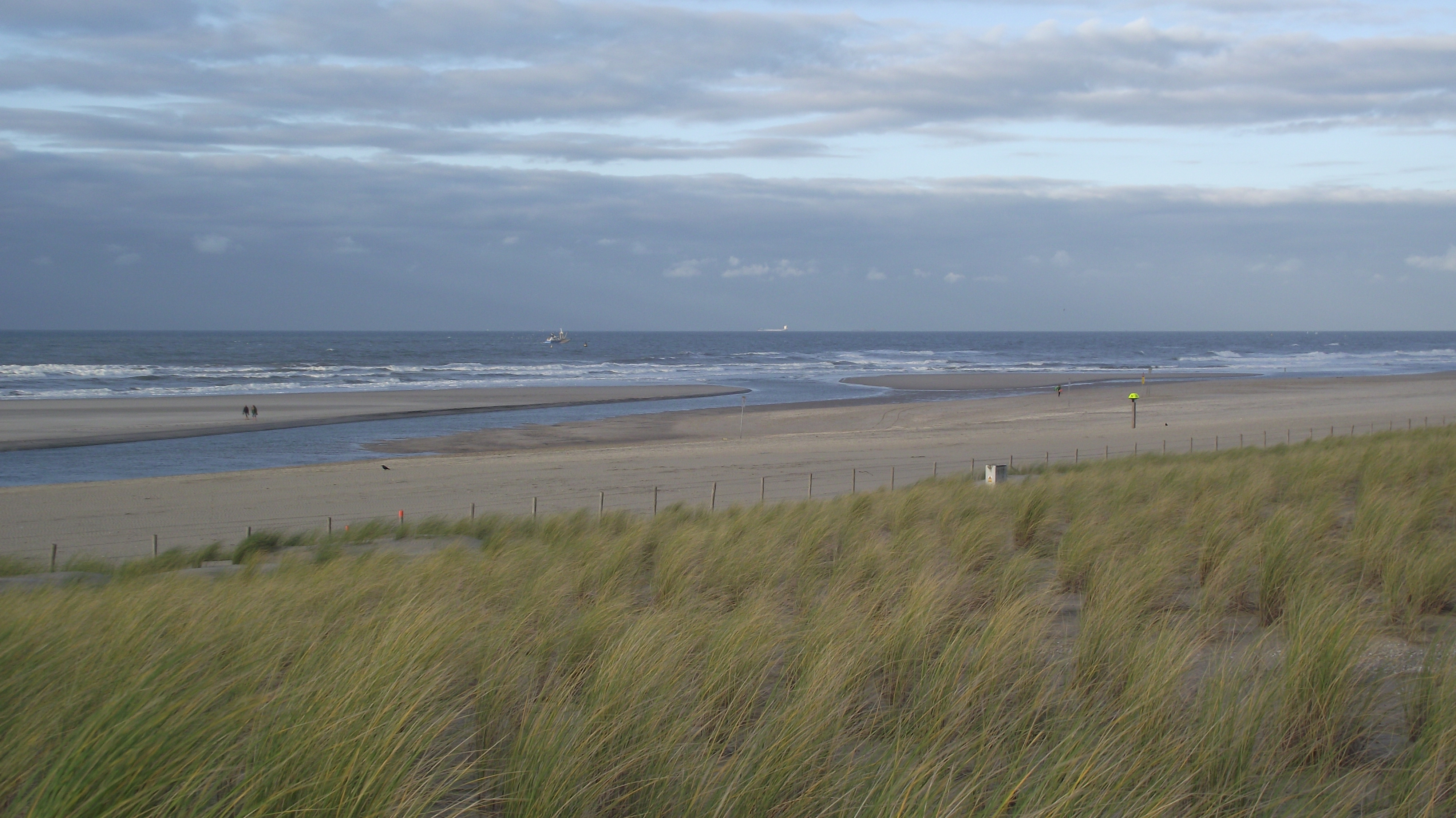 Zandmotor geulmonding herfst 2012. In de voorgrond is zijn amper de oorspronkelijk afgedamde geul te zien. (Ter hoogte van de zwarte vogel)